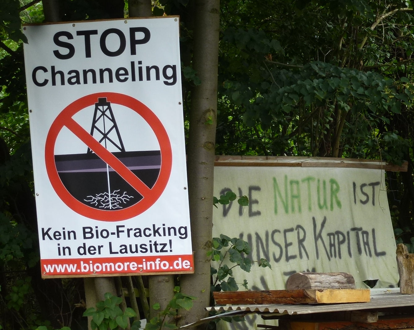 Protest gegen BioMOre bei Deschka